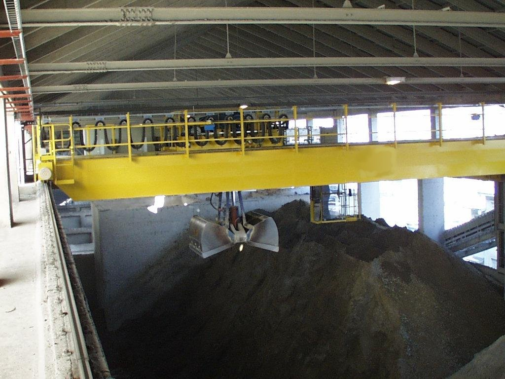 Beschreibung: Brückenkran mit 2-Schalen Hydraulikgreifer in einer Kalksteinlagerhalle im Schüttgutumschlag Quelle: Zementwerk in Österreich Fotograf oder Zeichner: Jürgen Sauer